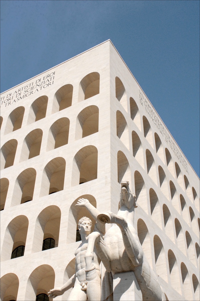 Le palais de la civilisation du travail Commencé en 1938 par Giovanni Guerrini, Ernesto Bruno La Padula et Mario Romano, ce bâtiment est le plus célèbre de l'EUR. Il comprend 6 étages d'arcatures ornées de sculptures (arts et activités) et domine le Tibre au sommet d'un escalier monumental. Quatre groupes sculptés délimitent le périmètre de l'édifice. Il vient de faire l'objet d'une rénovation pour en faire un centre ouvert au public. _____________ La création du nouveau quartier de Rome, appelé EUR : Esposizione Universale di Roma, a été décidée en 1936 par Benito Mussolini (1883-1945) pour célébrer le 20ème anniversaire de la marche sur Rome par une Exposition Universelle qui devait se tenir en 1942. Quelques bâtiments ont été construits mais les travaux d'aménagement et de construction ont été stoppés par la guerre. Les architectes chargés du projet étaient : Marcello Piacentini entouré de Giuseppe Pagano, Luigi Piccinato, Ettore Rossi, Luigi Vietti. Les travaux ont repris en 1951 avec l'ambition de faire de l'EUR un quartier d'affaires associé à une zone urbaine d'habitation reliée par le métro à Rome et par le train à Ostie.